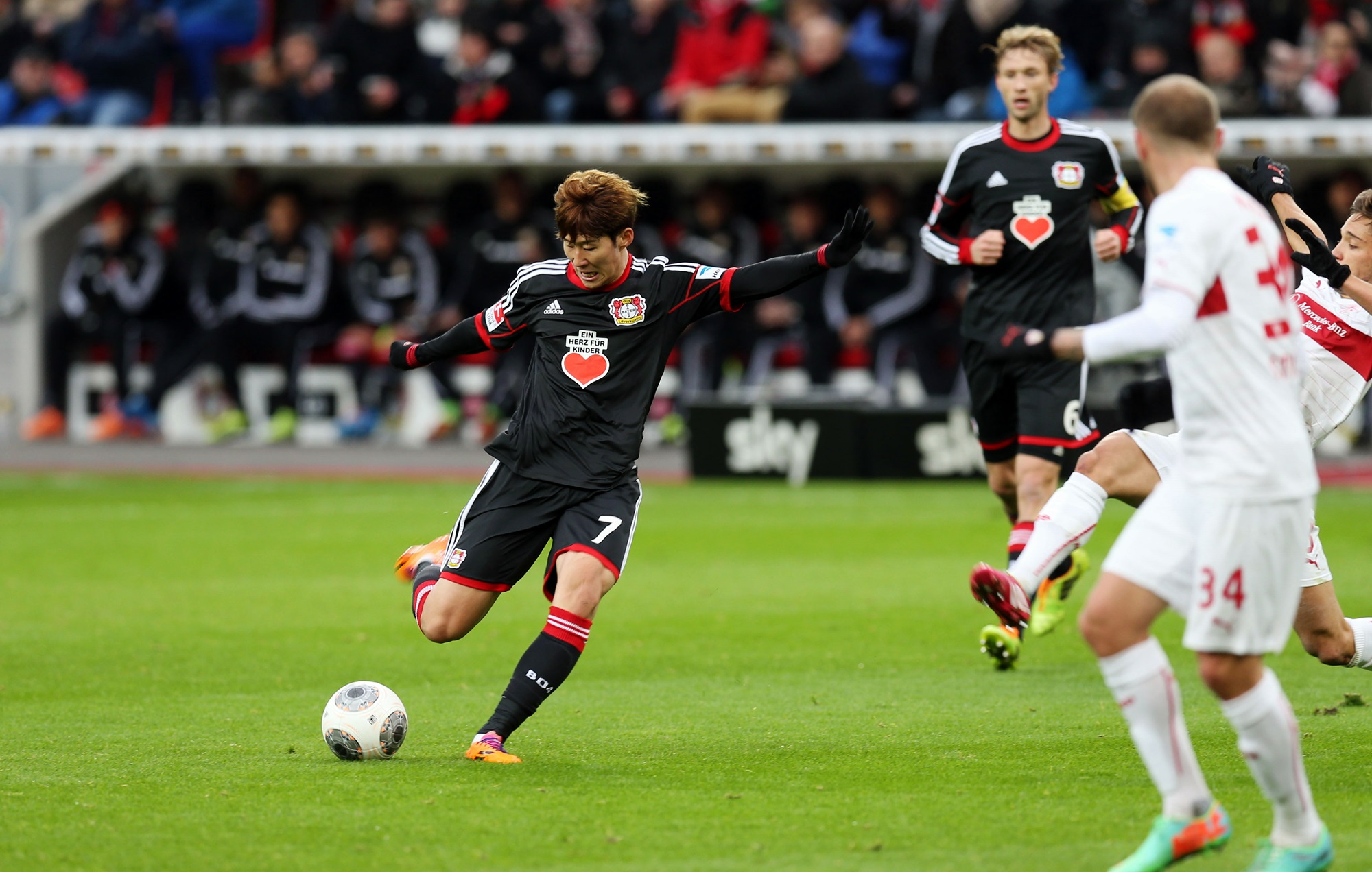 LG전자와 레버쿠젠이 △ 3개 경기 유니폼 광고권 어린이심장재단에 무상양도 △ 선수들이 사인한 그림 경매수익금 전액 기부 등 사회적 책임을 실천하는 '착한' 스포츠마케팅을 펼친다. 레버쿠젠 손흥민 선수가 독일 어린이심장재단 재단의 로고가 새겨진 셔츠를 입고 경기에 임하고 있다. ※ Social LG전자 에서 관련 보도자료를 확인하실 수 있습니다.